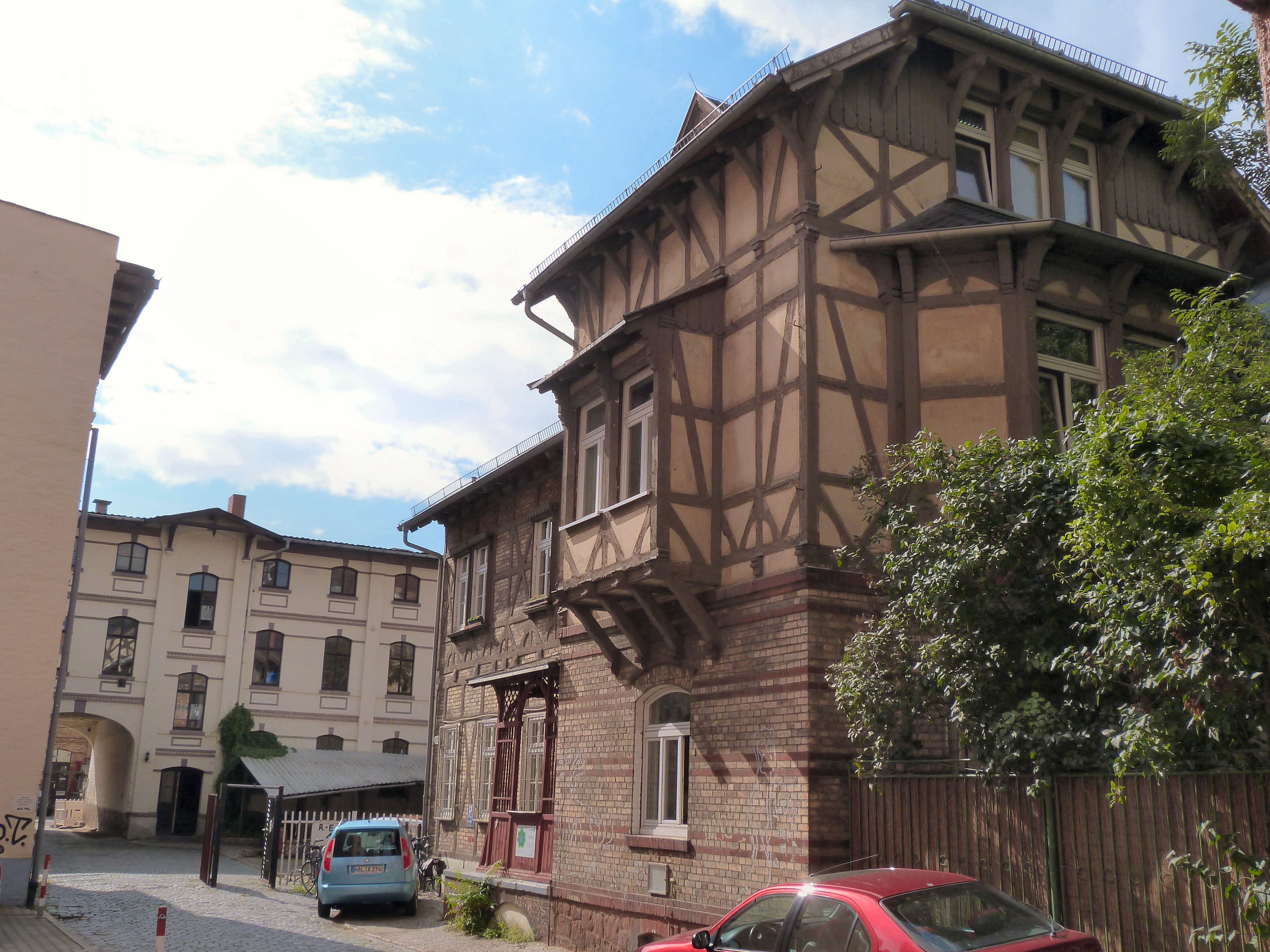 Rudolf-Ernst-Weise-Straße 8 und 10 (im Hintergrund), Halle (Saale)